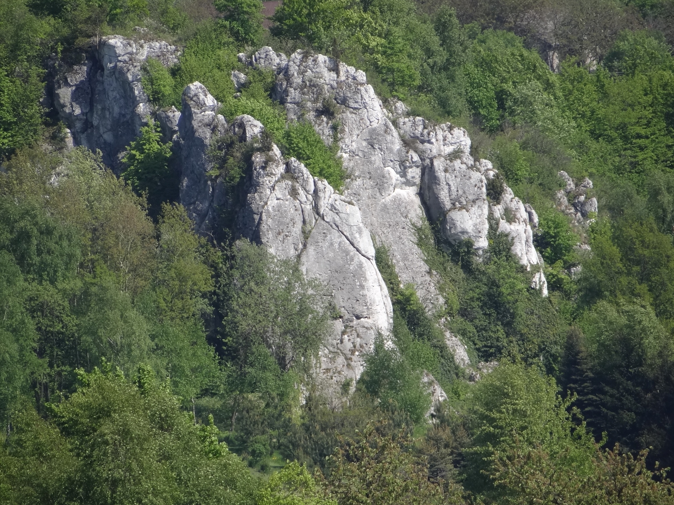 Psiklatka. Widok z Wzgórza 502